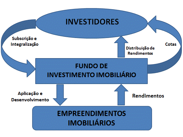 Estrutura - Fundo de Investimento Imobiliário